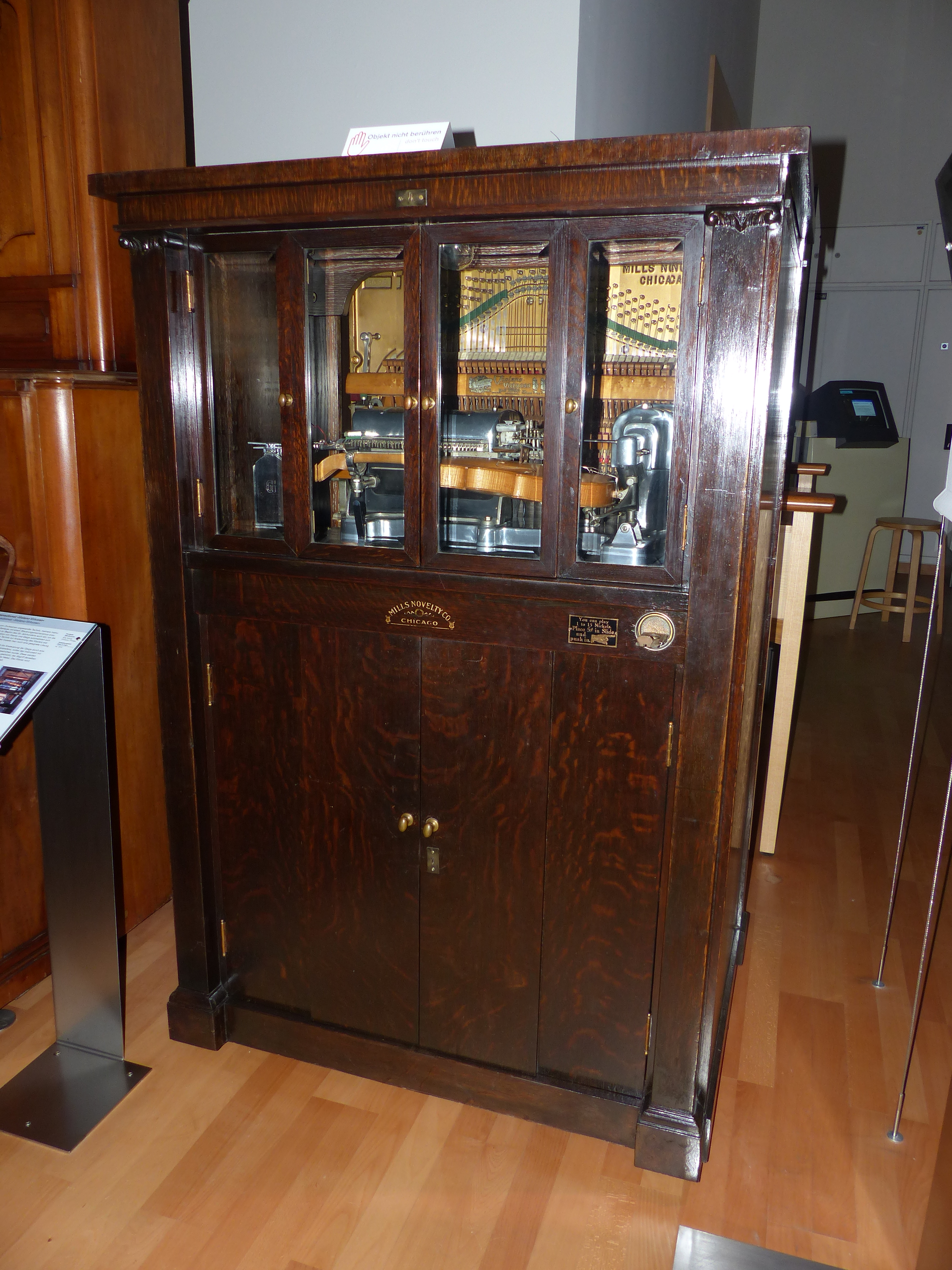 Geigenautomat Violano-Virtuoso, Millis Novelty Company, Chicago, ca. 1915; Exponat im Technischen Museum Wien